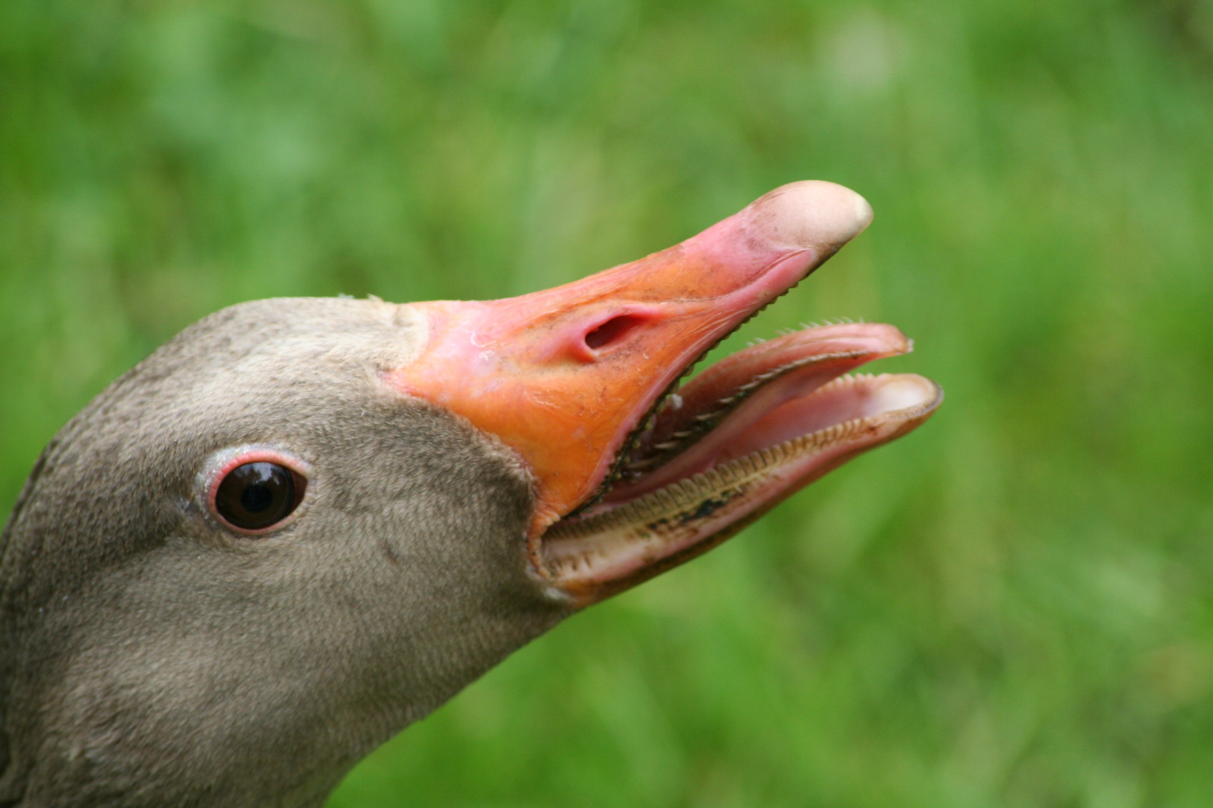 Anser anser. Photgraphiert im Schulgarten der Stadt Braunschweig, Nds., Deutschland. Digital aufgenommen, nicht nachbearbeitet.